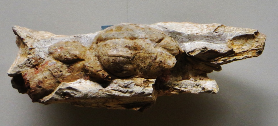 Fossil of Diplobune- Took the picture at Museum am Lowentor, Stuttgard